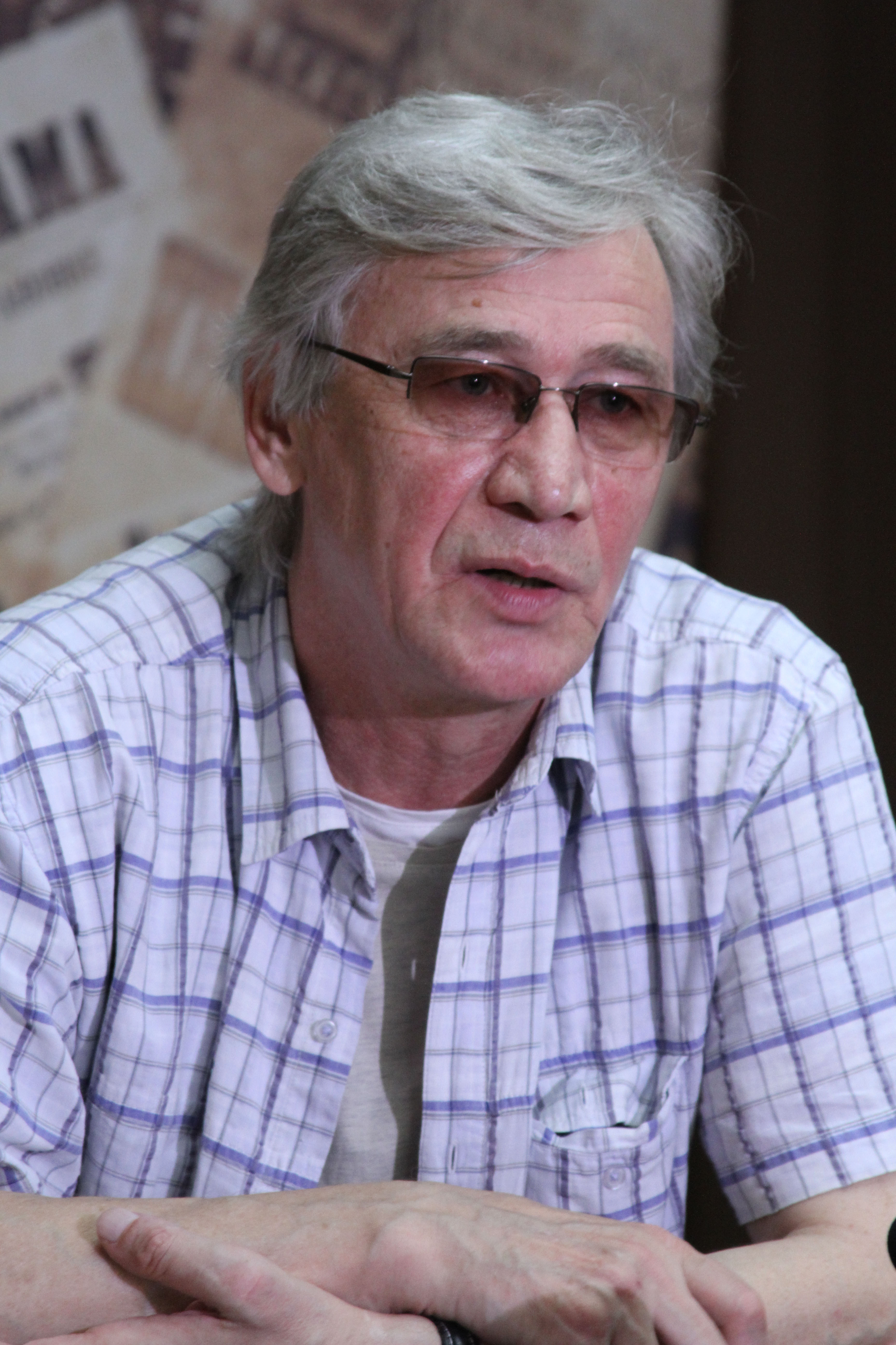 Драматург Алексей Слаповский. Пресс-конференция в Саратовском академическом театре драмы 23 сентября 2015 года.